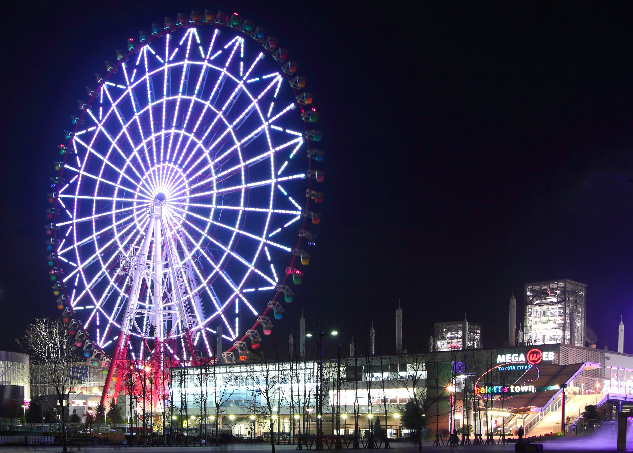 パレットタウン（東京都江東区）